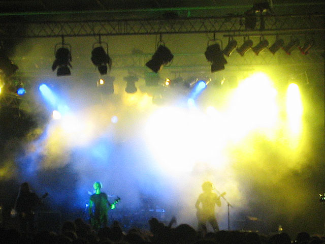 Голландская дэт-метал группа Gorefest, на фестивале Wacken в 2005 году.